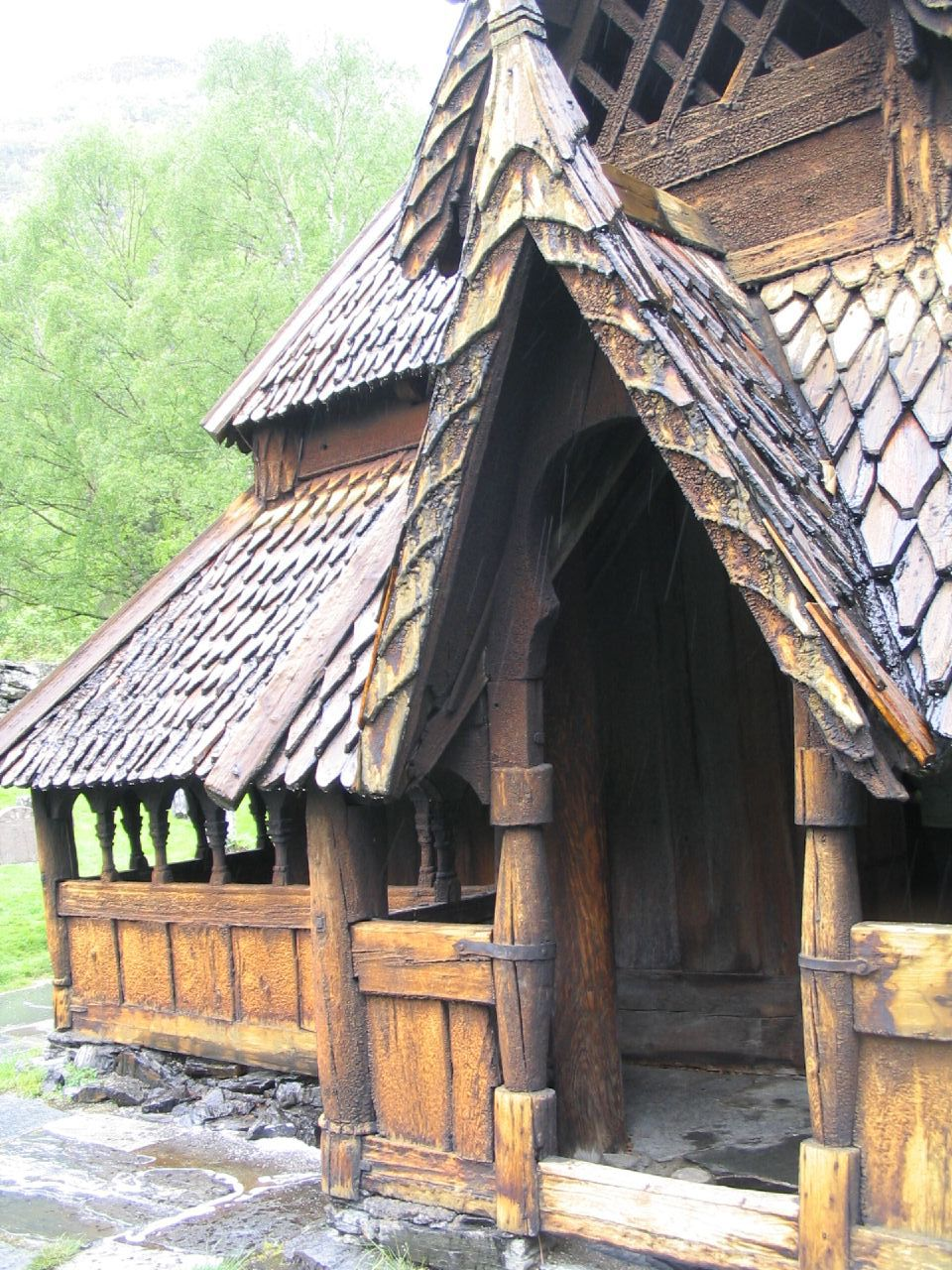 Borgund stavkyrkje